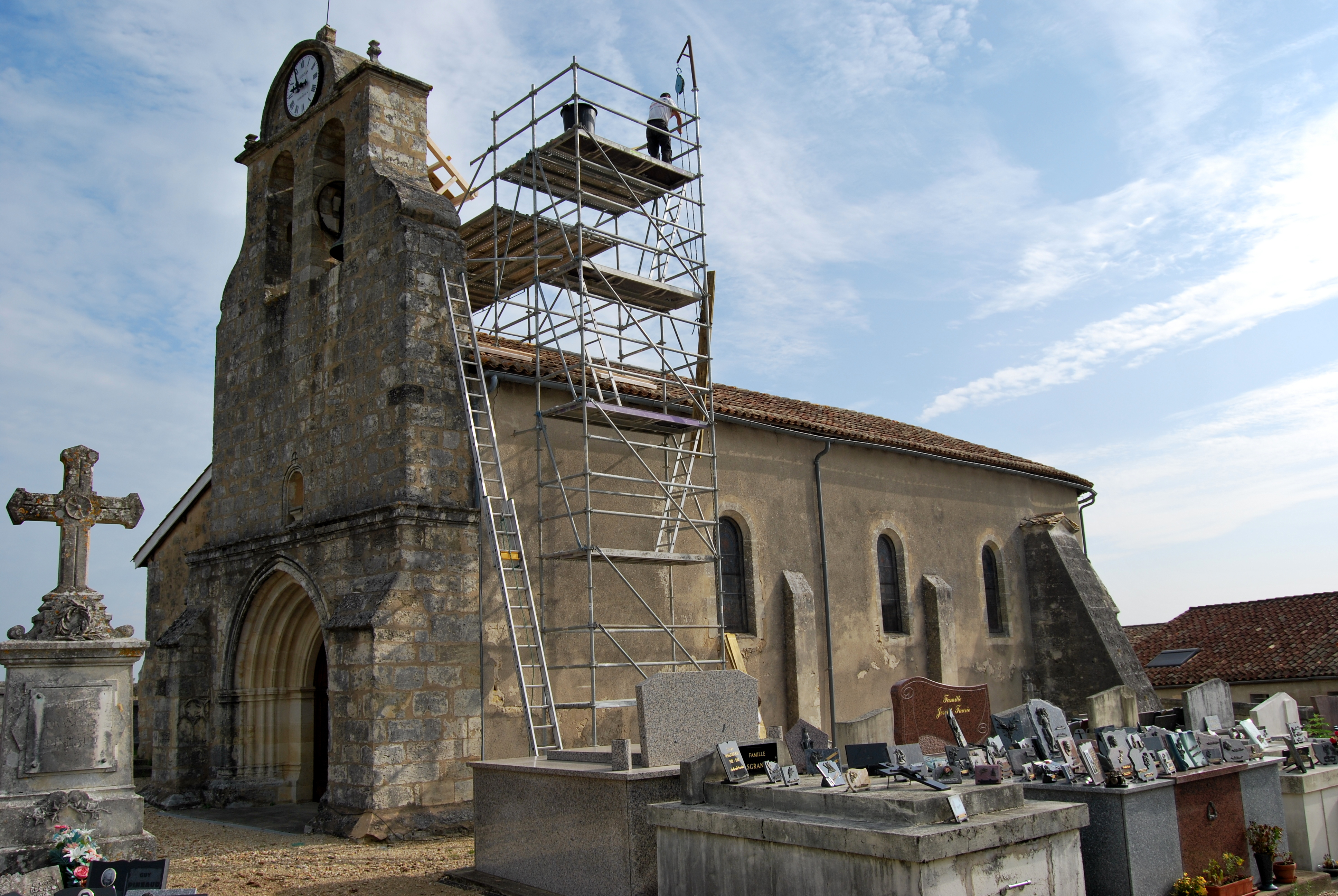 Église Saint-Seurin de Saillans .